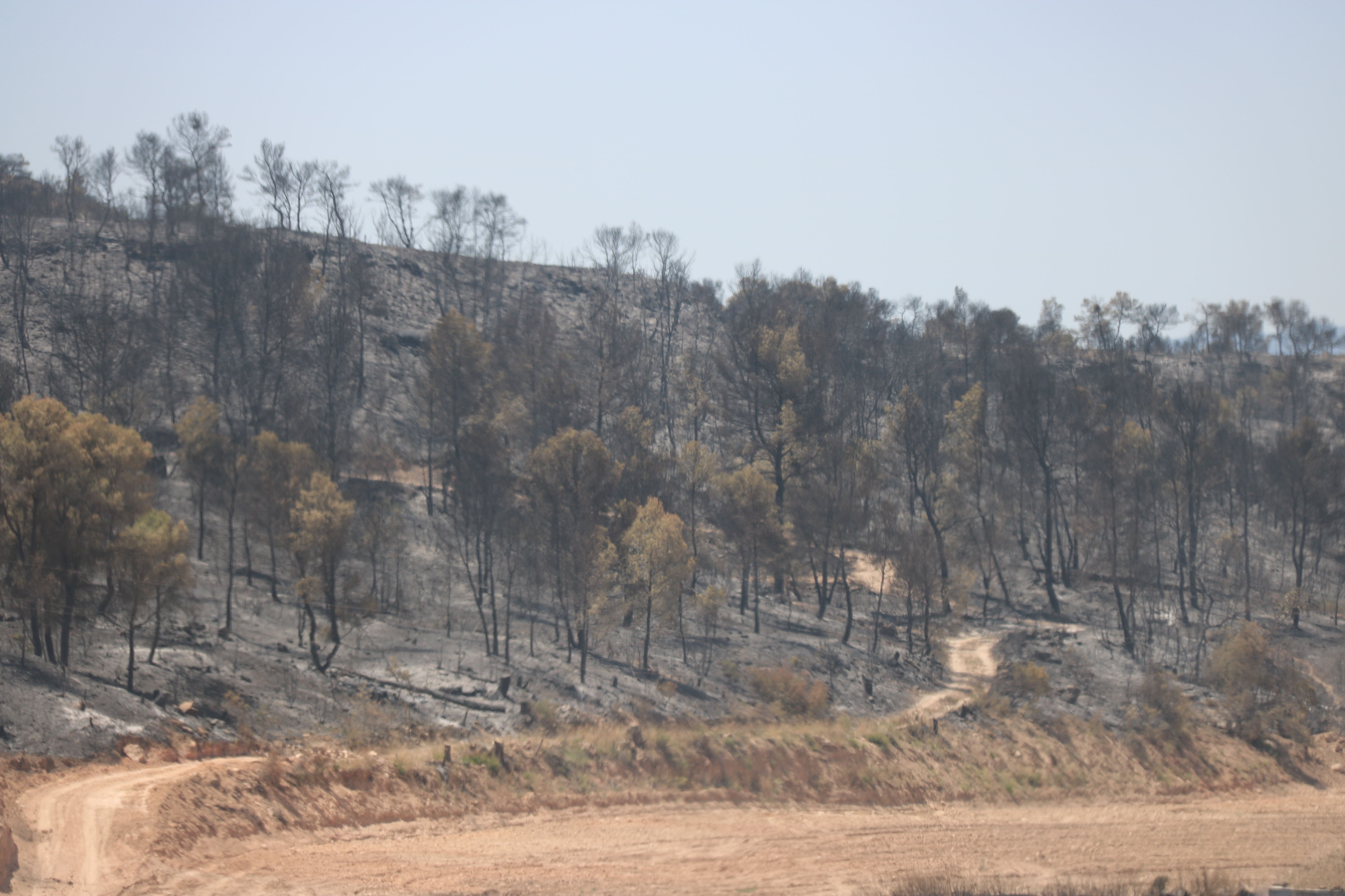 L'incendi de la Ribera d'Ebre entre Flix i Bovera, el 28 de juny del 2019.